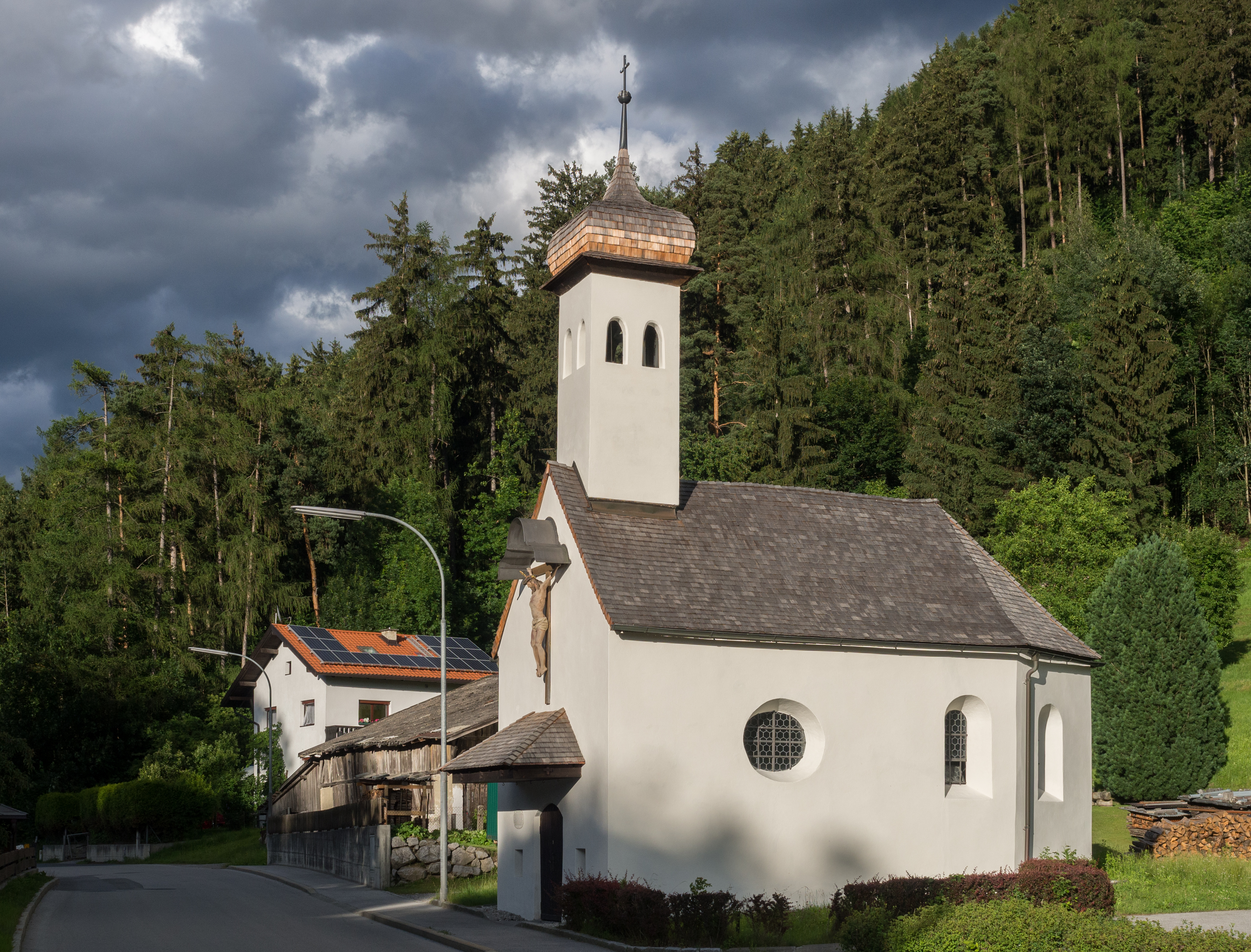 Die Egerdachkapelle zwischen Innsbruck-Amras und Ampass im Abendlicht